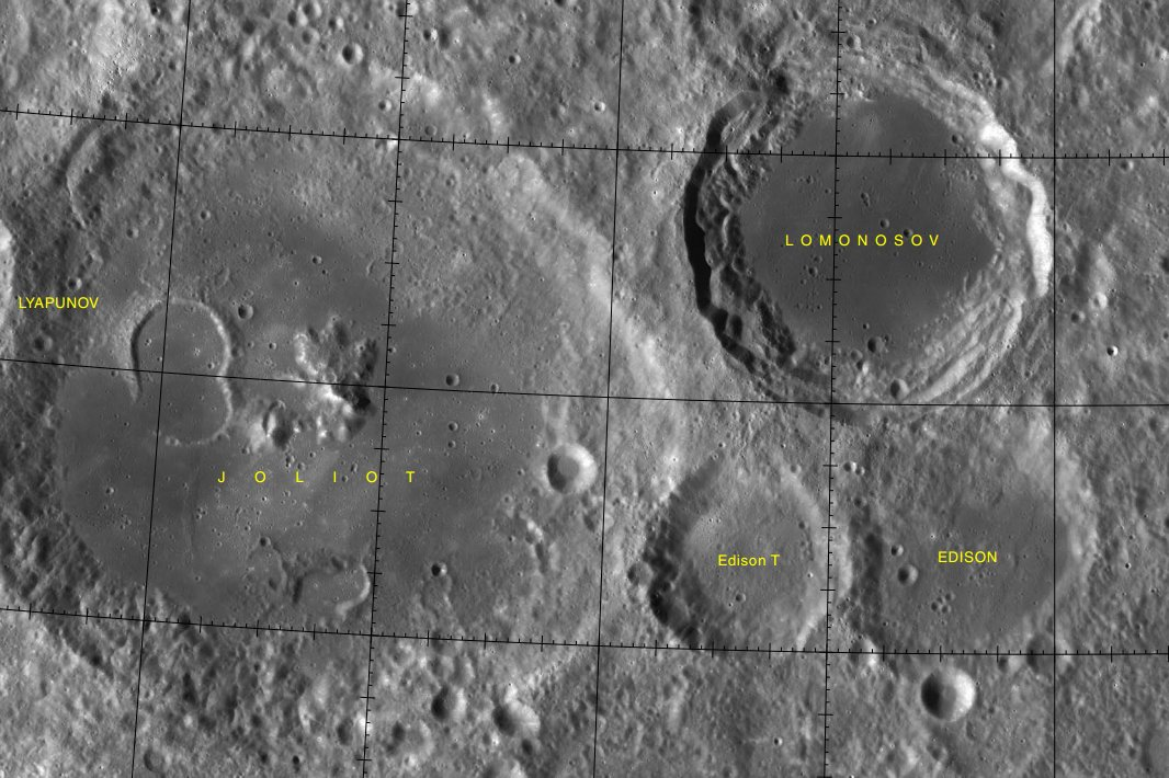 Cráter lunar Edison. Localización (Imagen LROC)